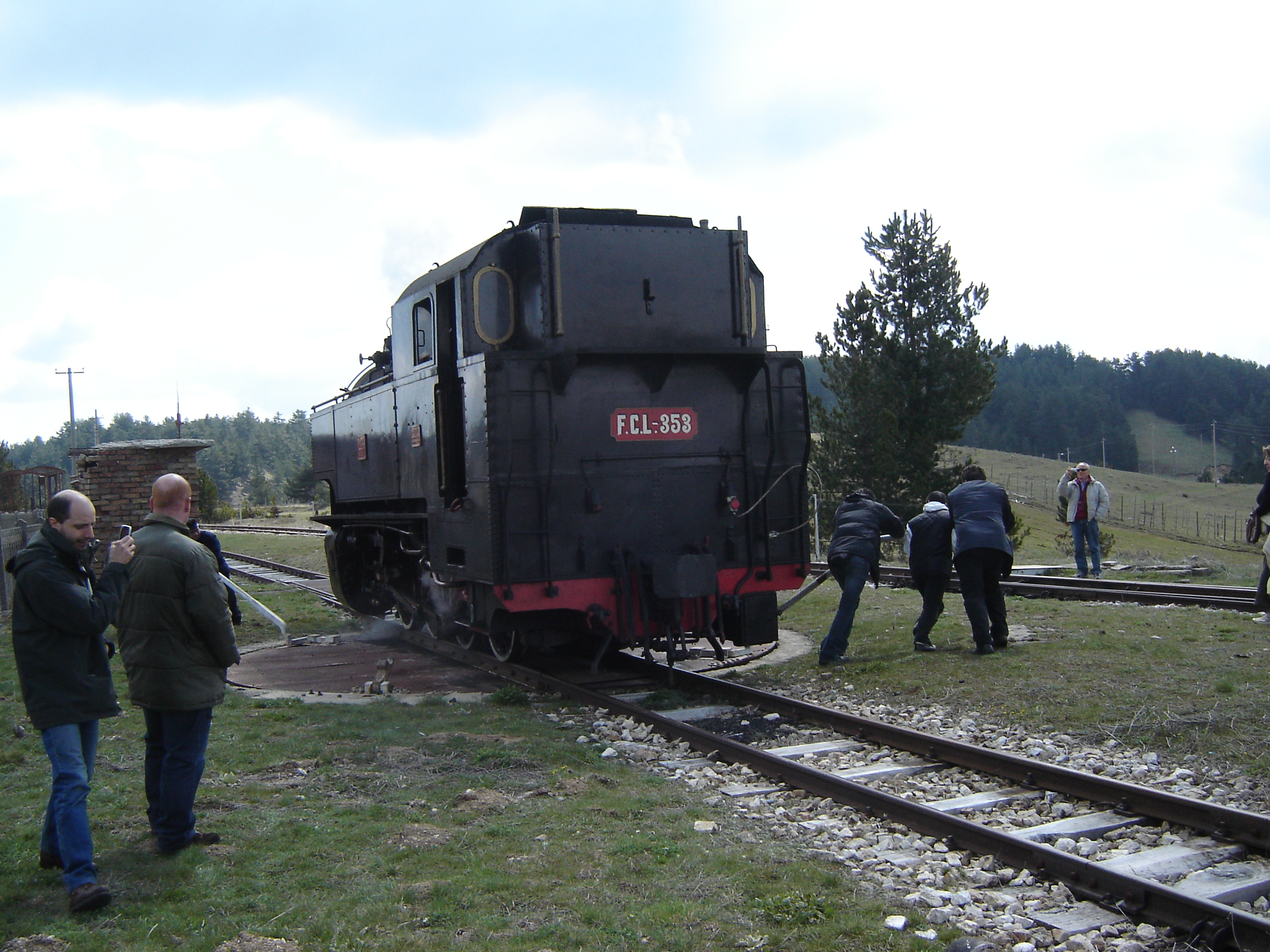 Locomotiva FCL 353 in attesa di essere girata su piattaforma a S.Nicola Silvana Mansio